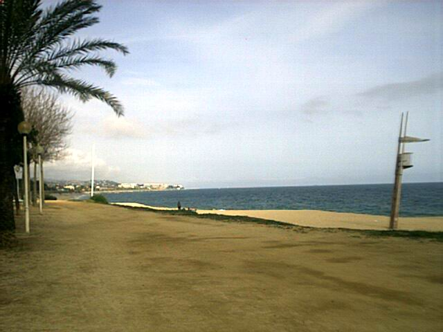 Platja del Callao, a Mataró, comarca del Maresme, Catalunya.